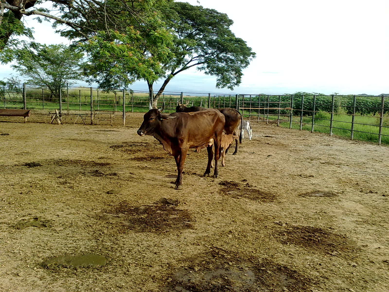 VISITANDO UNAS DE LOS HATOS EN COJEDES